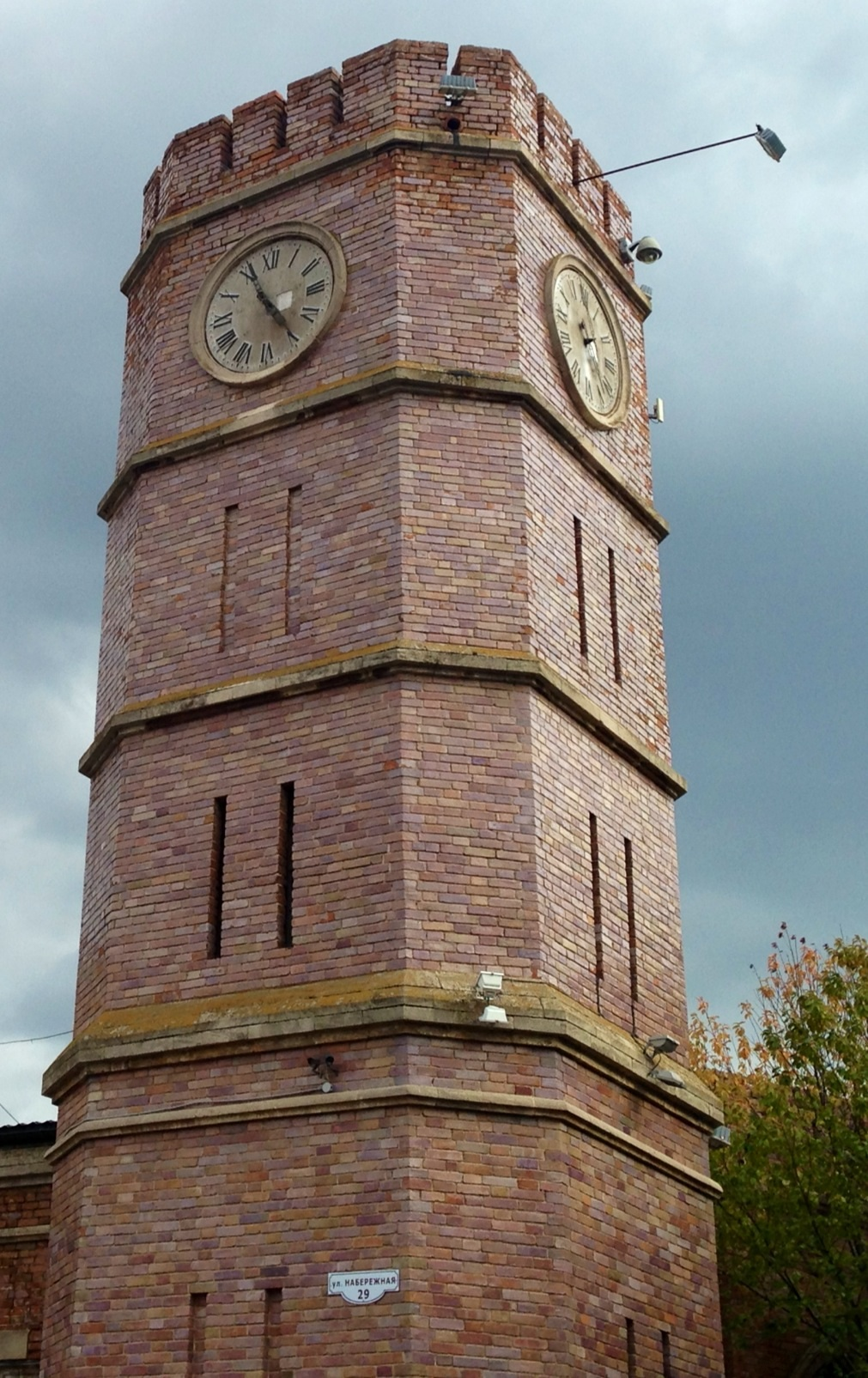 Здание гауптвахты (архив, казна) (Оренбургская область, Оренбург, Набережная улица, 29)